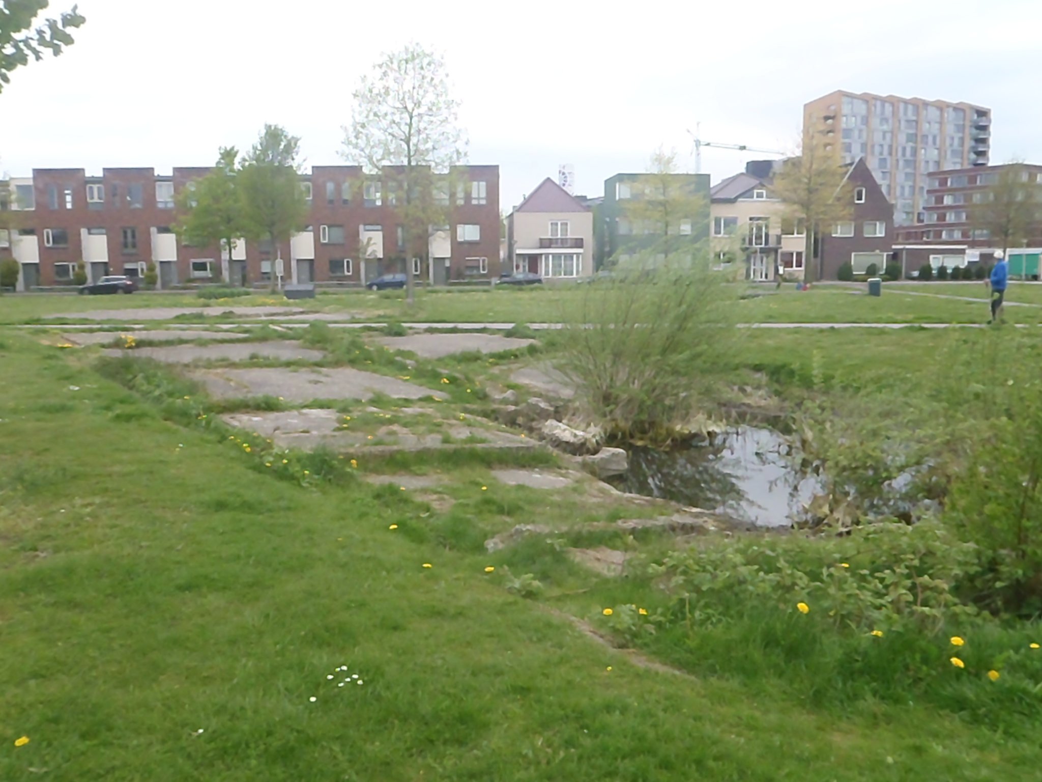 de bewaarde krater van de vuurwerkramp in enschede in het vernieuwde roombeek